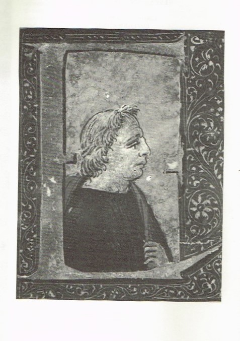 Porträtminiatur, Initiale 'E' mit dem Konterfei des Buchhändlers VdB